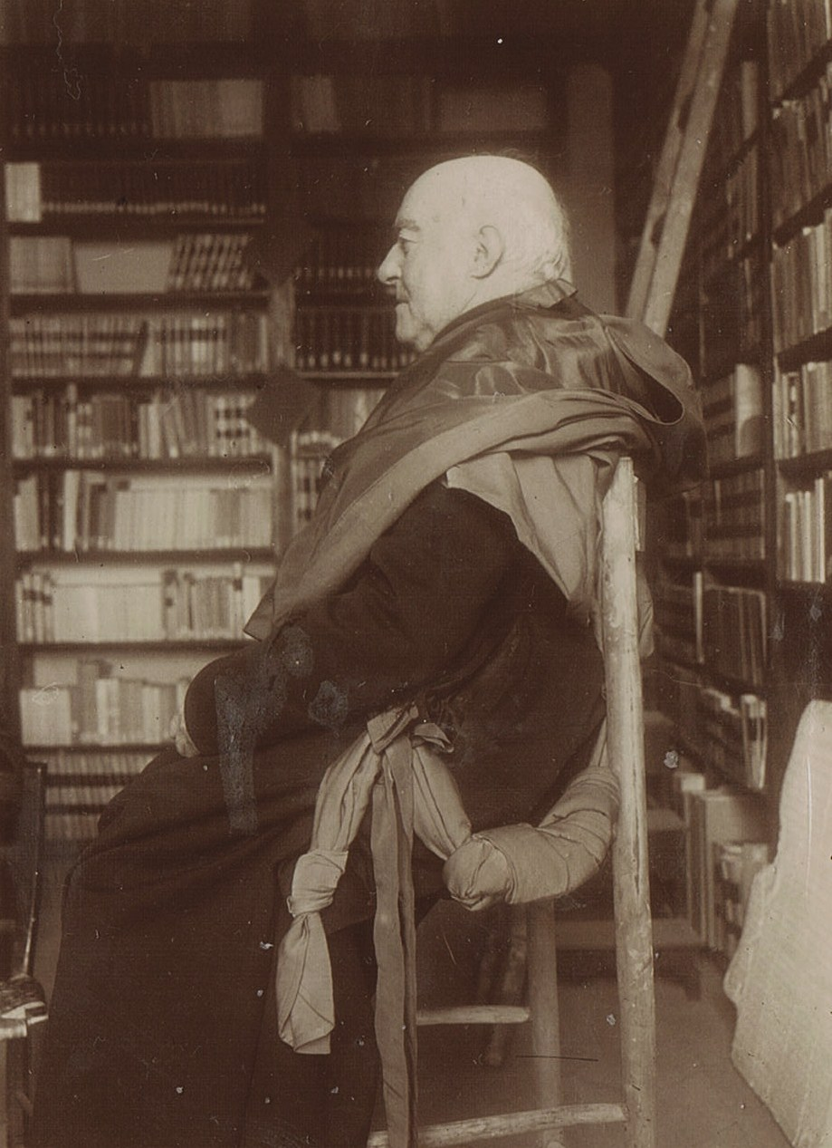 L'historien Louis Duchesne ( 1843-1922) posant pour le sculpteur français Philippe Besnard.